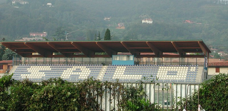 Stadio Lino Turina della AC Salò Source: photo uploaded by User:RicciSpeziari. Photographer: Riccardo Speziari